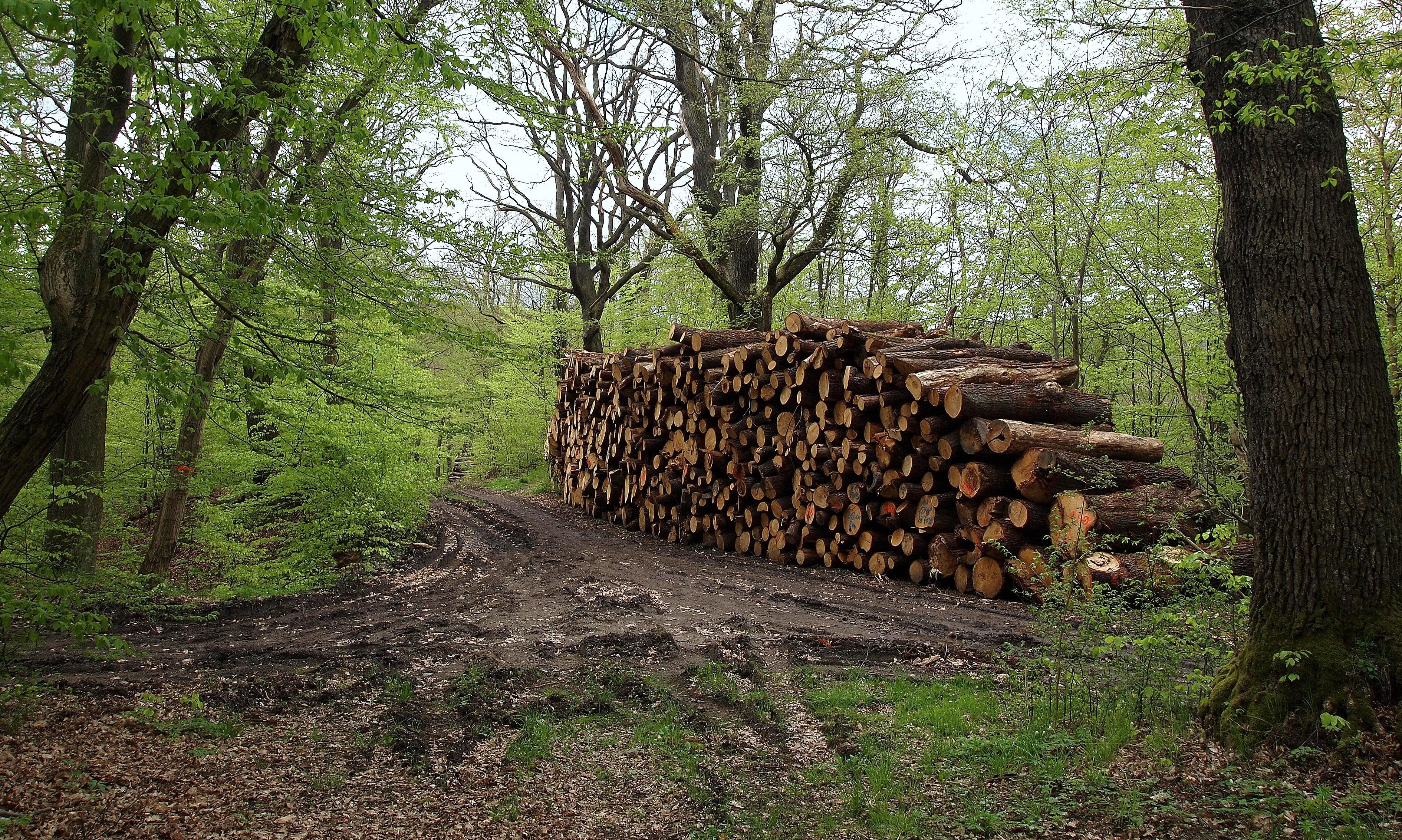 Altenbrak (Stadt Thale) Landkreis Harz, Sachsen-Anhalt; Polter an der Alten Straße